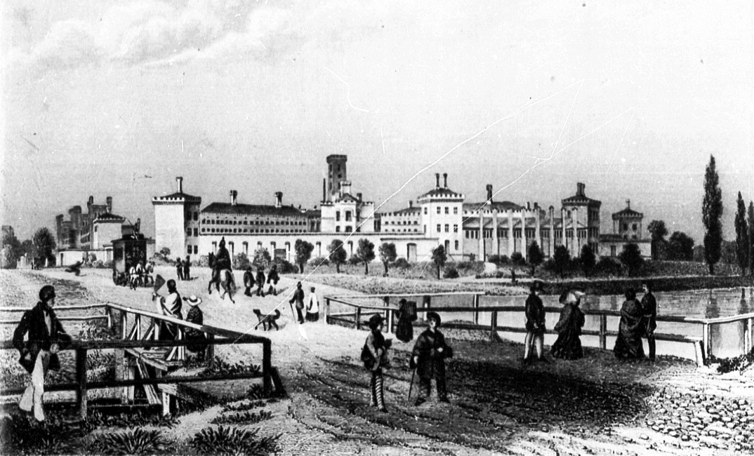 Stich des Zellengefängnisses in Berlin-Moabit von 1855.